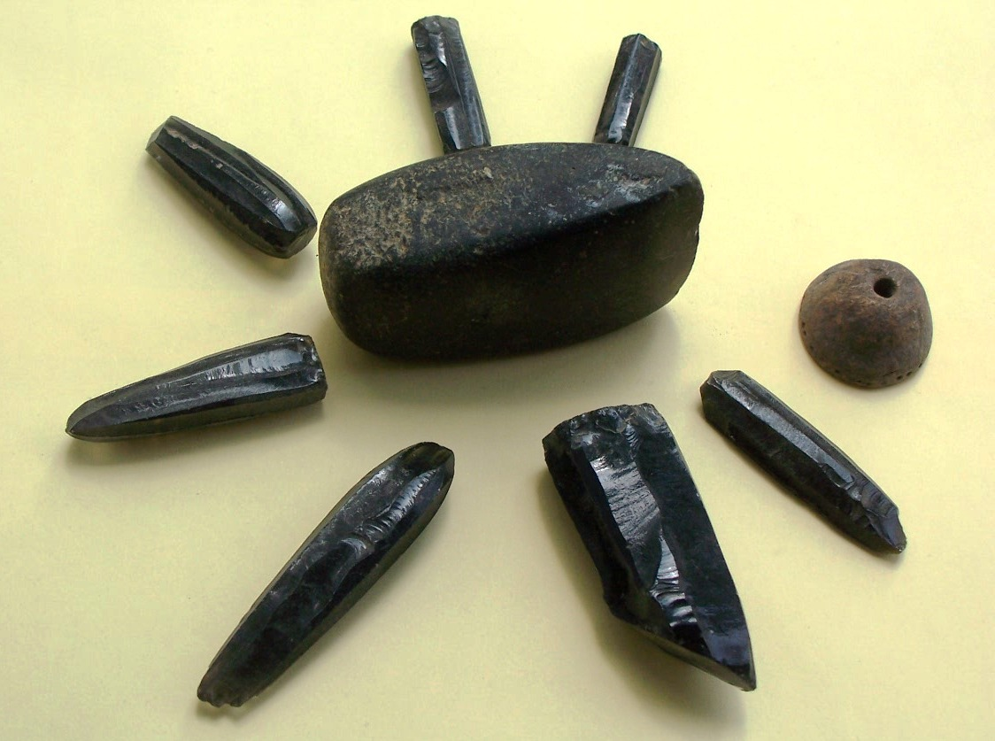 Hacha de piedra, puntas de flecha y malacate prehispánicos, San Juan Achiutla, Oaxaca, México